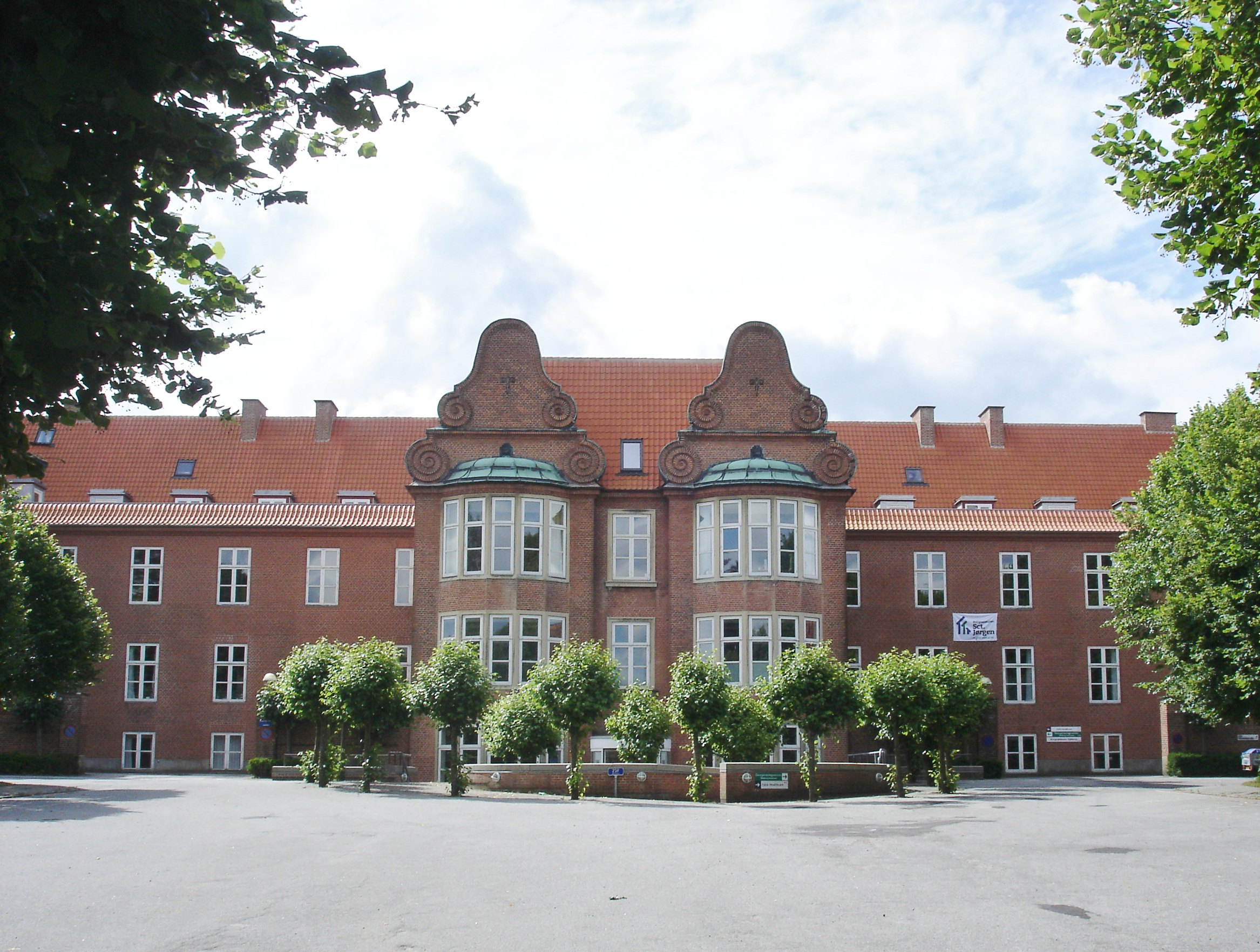 Kjellerup Sygehus